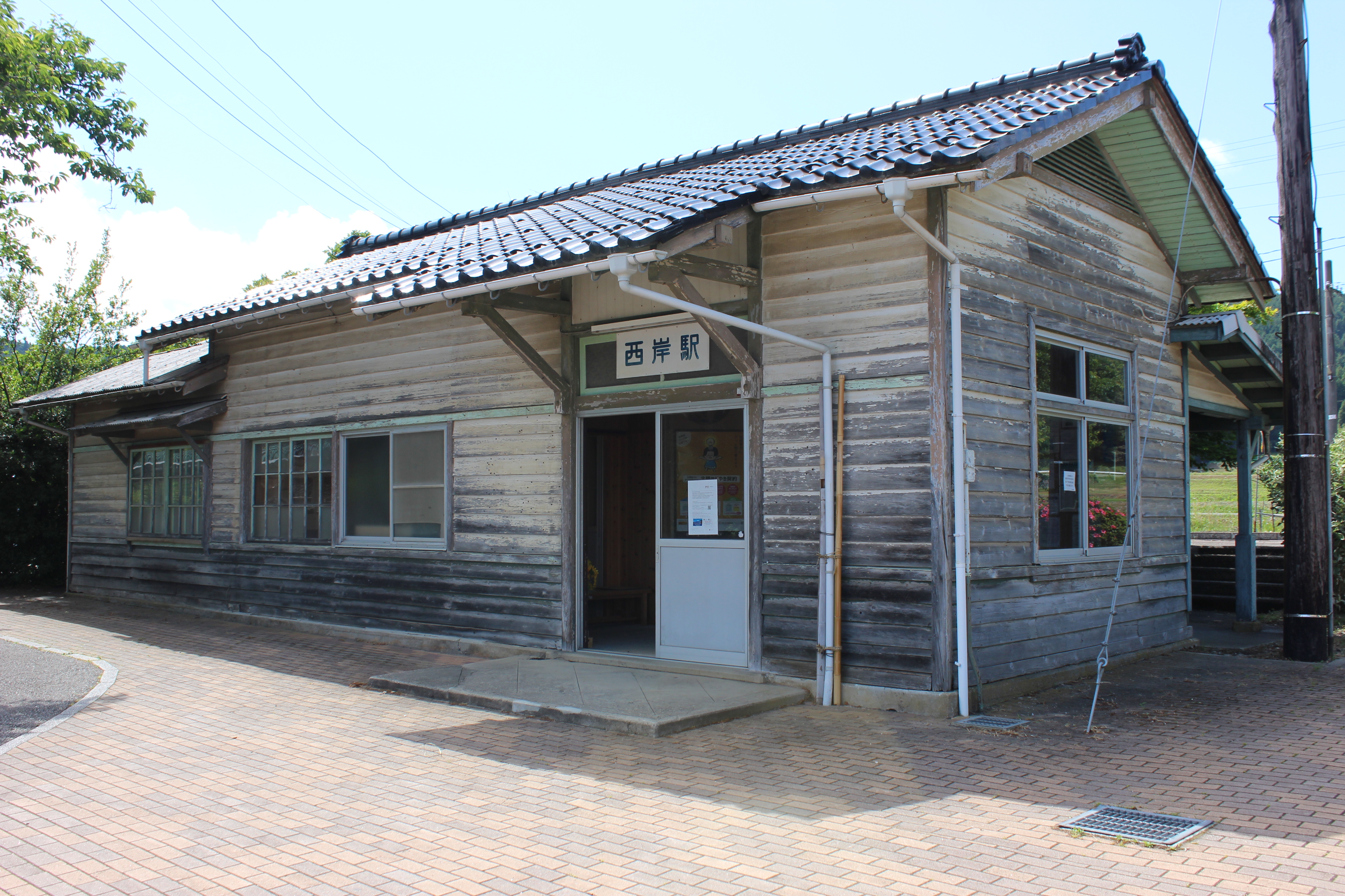 西岸駅（石川県七尾市） Canon EOS Kiss X5